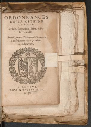 Page de garde des "Ordonnances de la Cité de Genève", imprimé le 25 janvier 1600 et publié le 30 janvier 1600